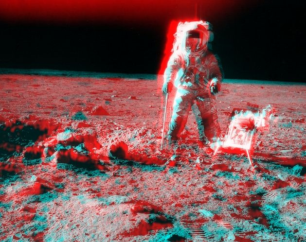 Астронавт Аполлона 12 Пит Конрад (Pete Conrad) на поверхности Луны вблизи южного края кратера Сюрвейор в ноябре 1969 года. Анаглифная версия.